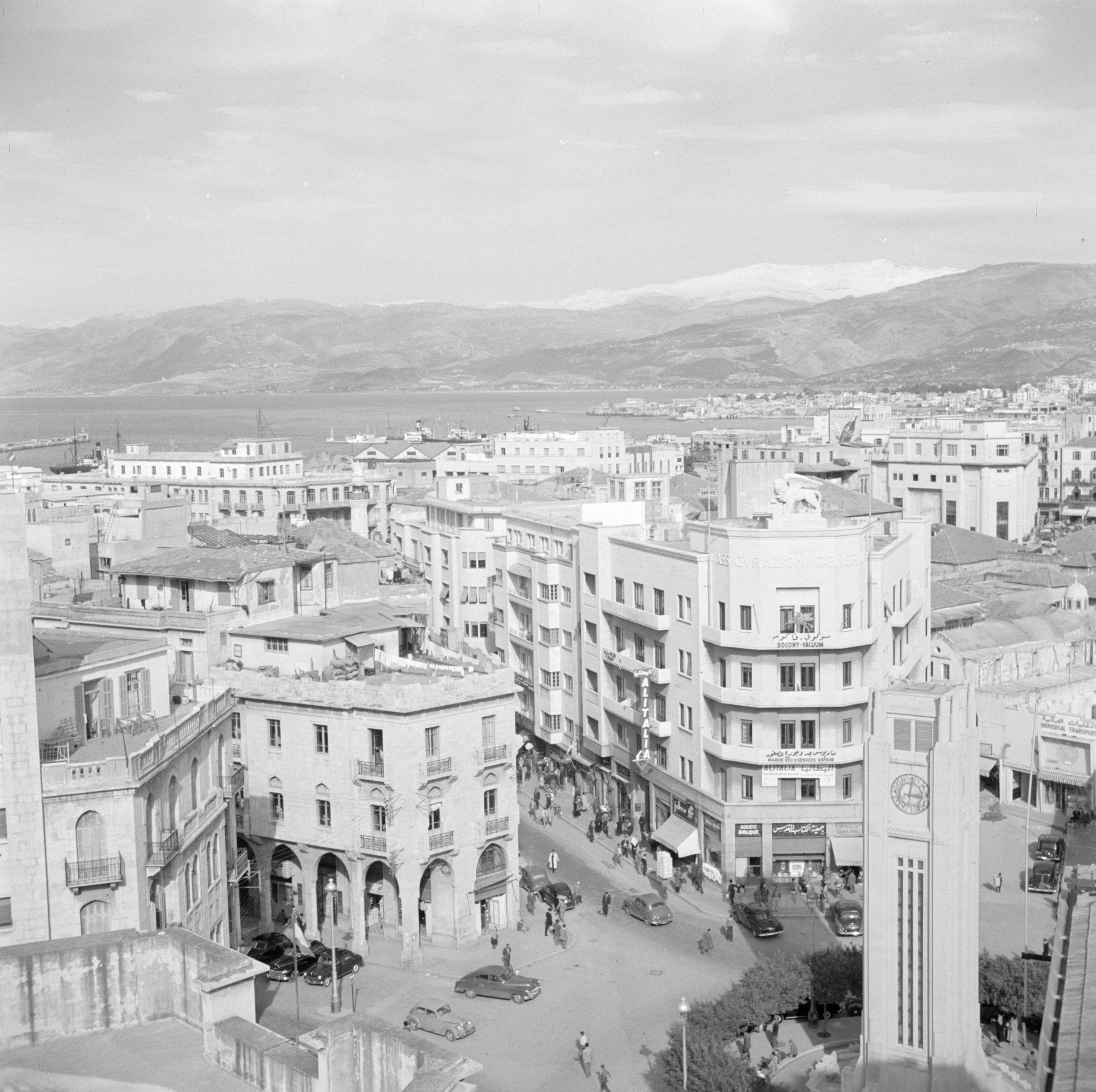 Collectie / Archief : Fotocollectie Van de Poll Reportage / Serie : Midden-Oosten 1950-1955: Libanon Beschrijving : Zicht op Beiroet van een van de daken Datum : 1950 Locatie : Beiroet, Libanon Trefwoorden : auto's, straatbeelden Fotograaf : Poll, Willem van de Auteursrechthebbende : Nationaal Archief Materiaalsoort : Negatief (zwart/wit) Nummer archiefinventaris : bekijk toegang 2.24.14.02 Bestanddeelnummer : 255-6170